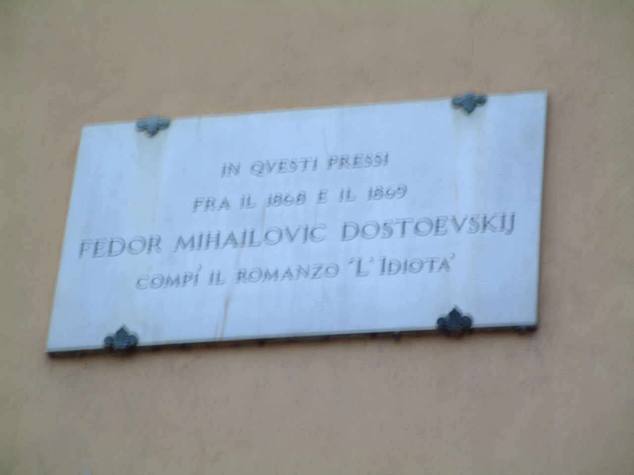 В этом доме Ф.М. Достоевский работал над "Идиотом"